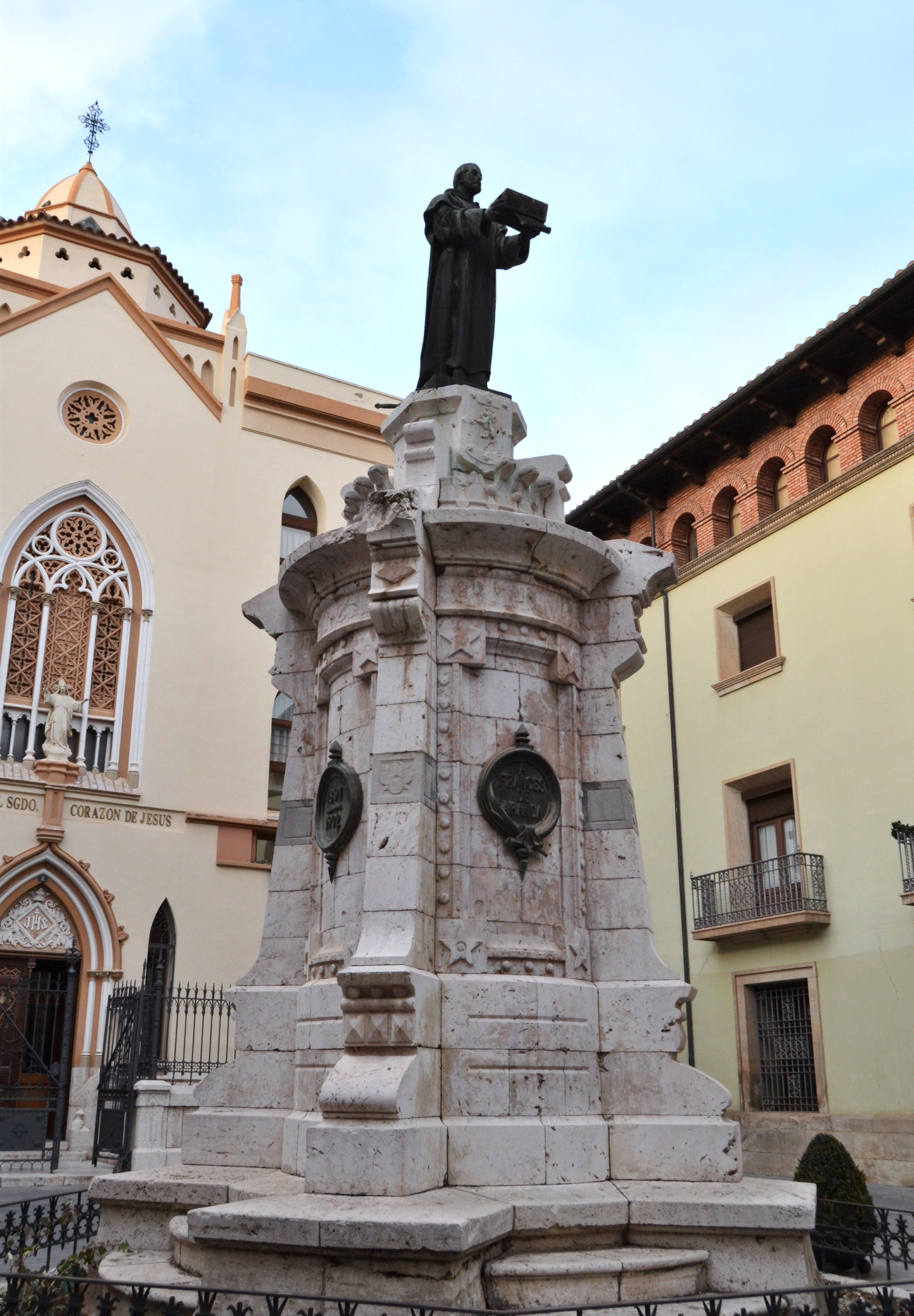 Monument a Francesc d'Aranda, Terol.